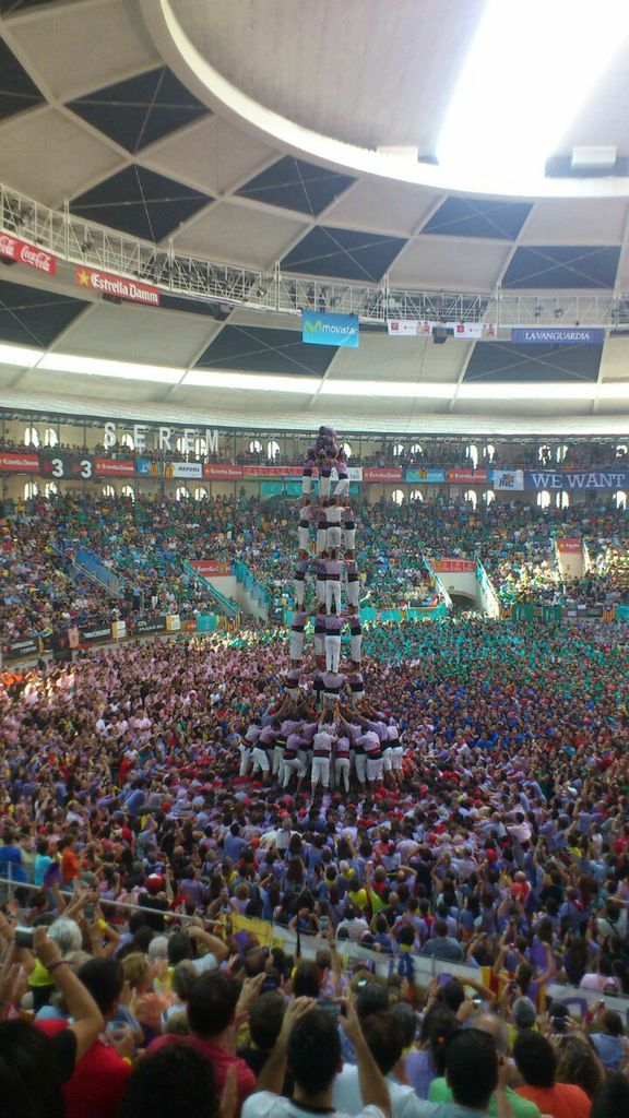 11è 5 de 9 amb folre descarregat per la Colla Jove Xiquets de Tarragona al XXV Concurs de castells de Tarragona.